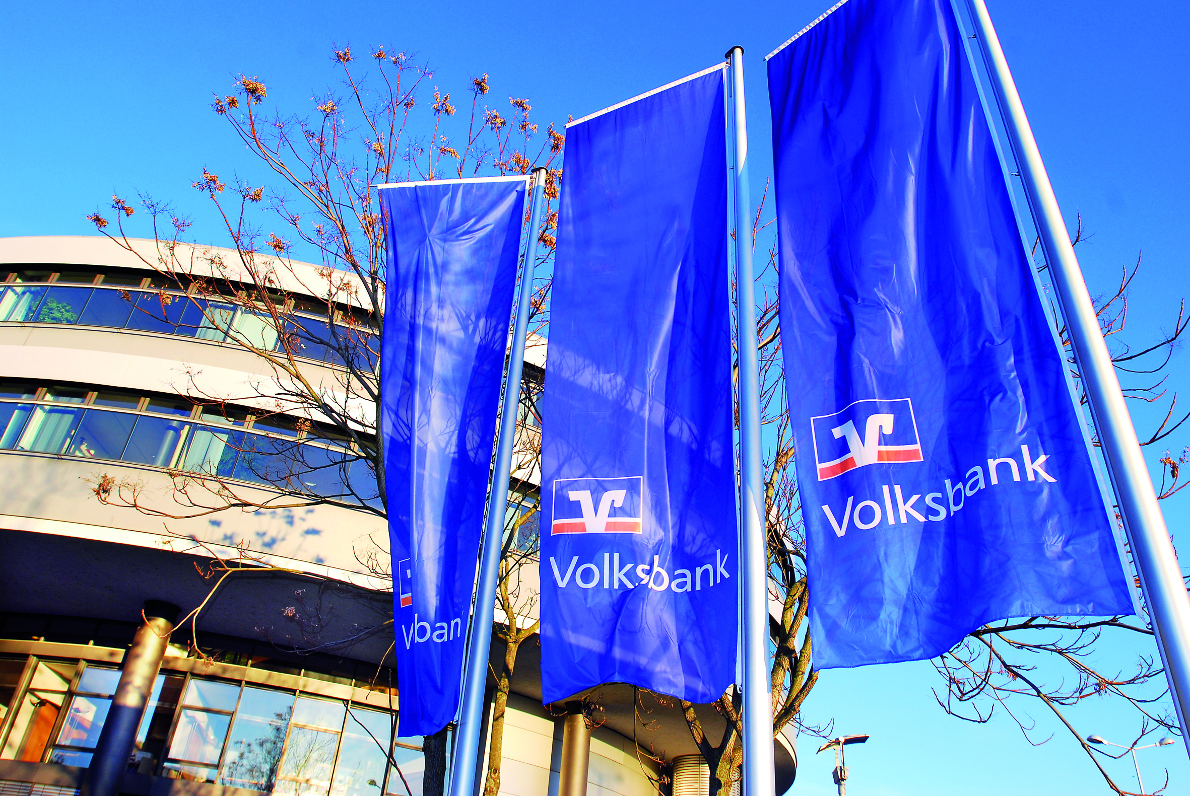 Architektur des Hauptsitzes der Volksbank Göppingen eG